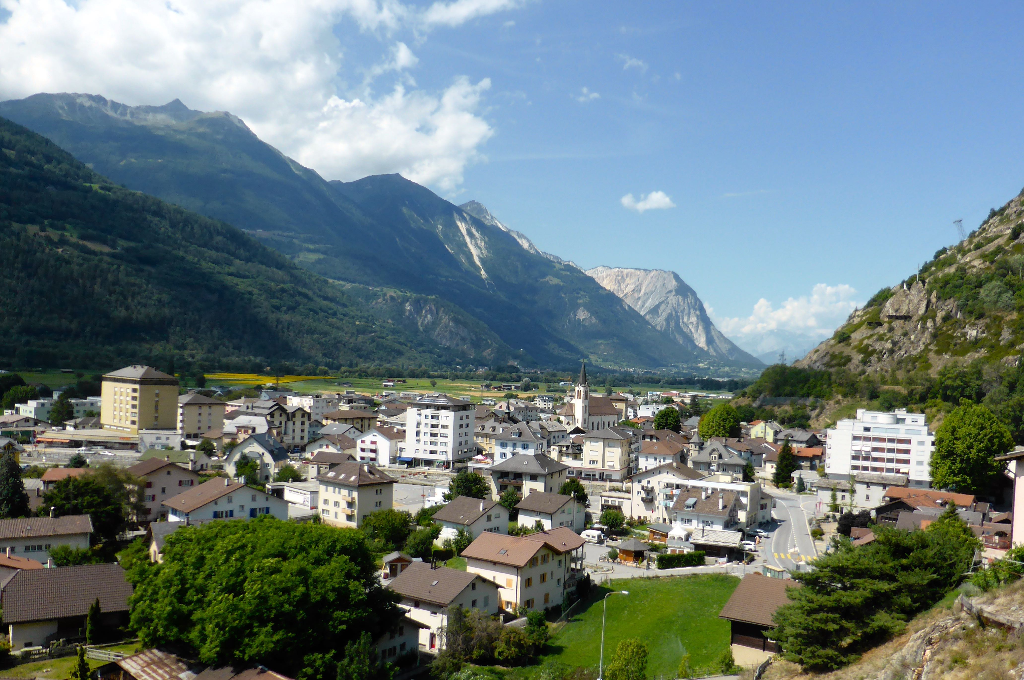 Une vue du village de Gampel